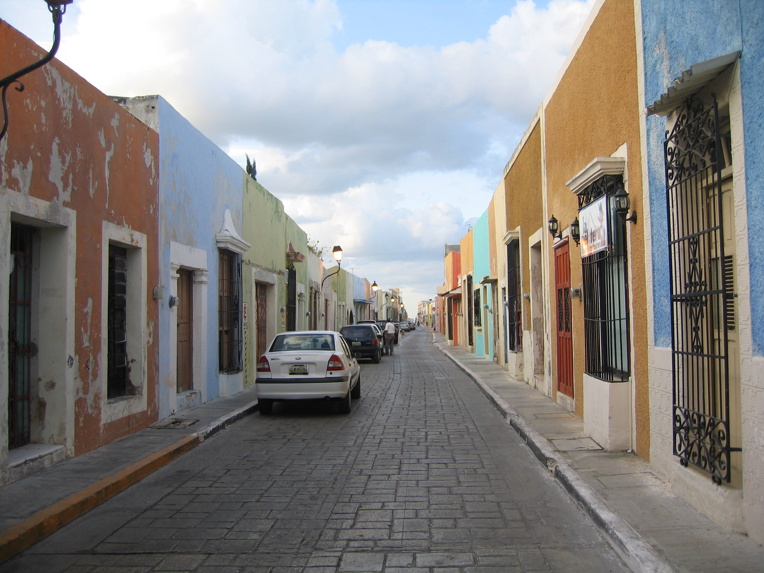 Unesco Weltkulturerbe Innenstadt Campeche, Mexico